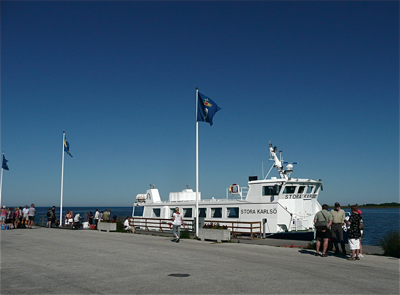 Dag 2 till Stora Karlsö